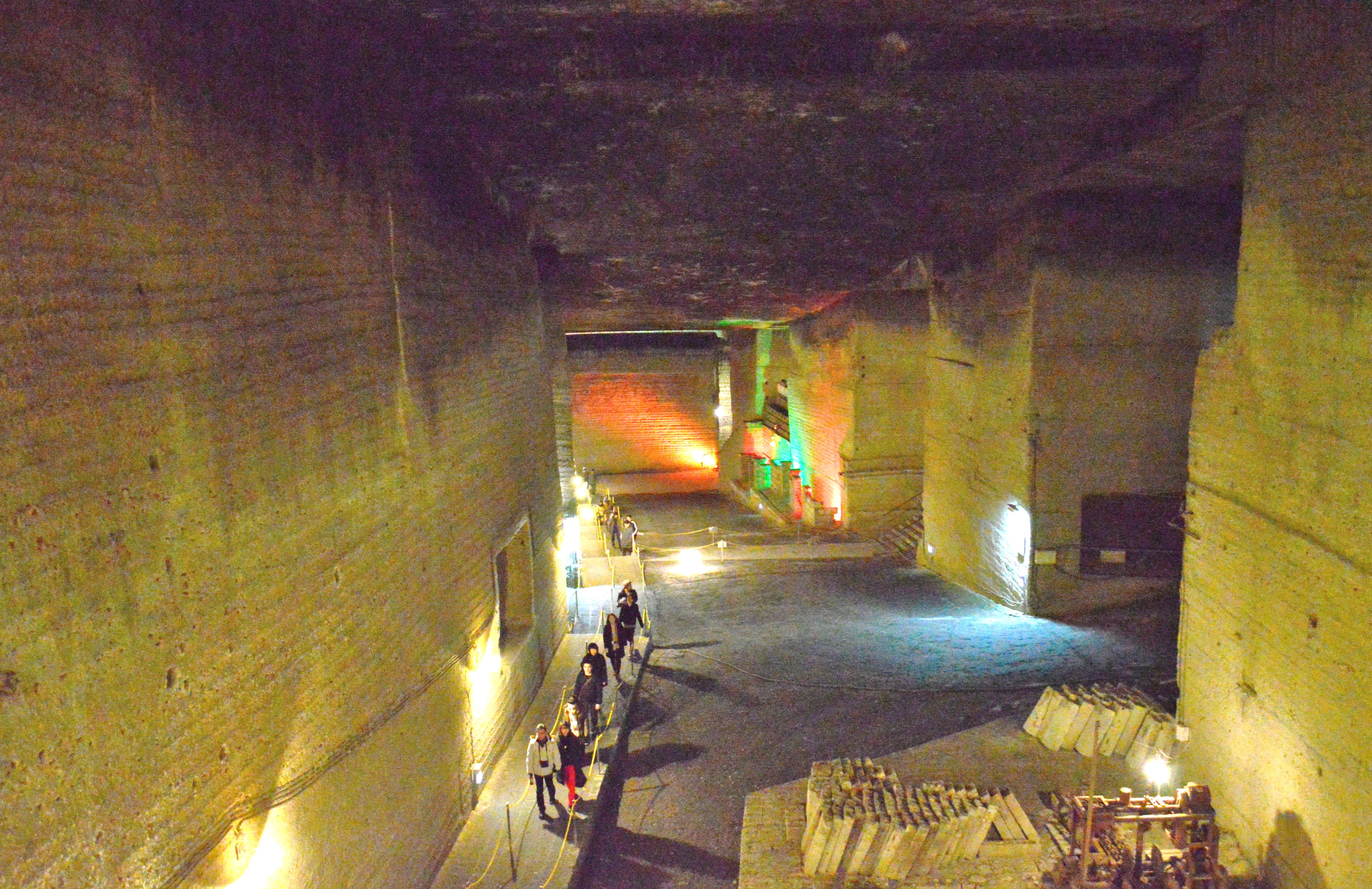 大谷採掘場跡